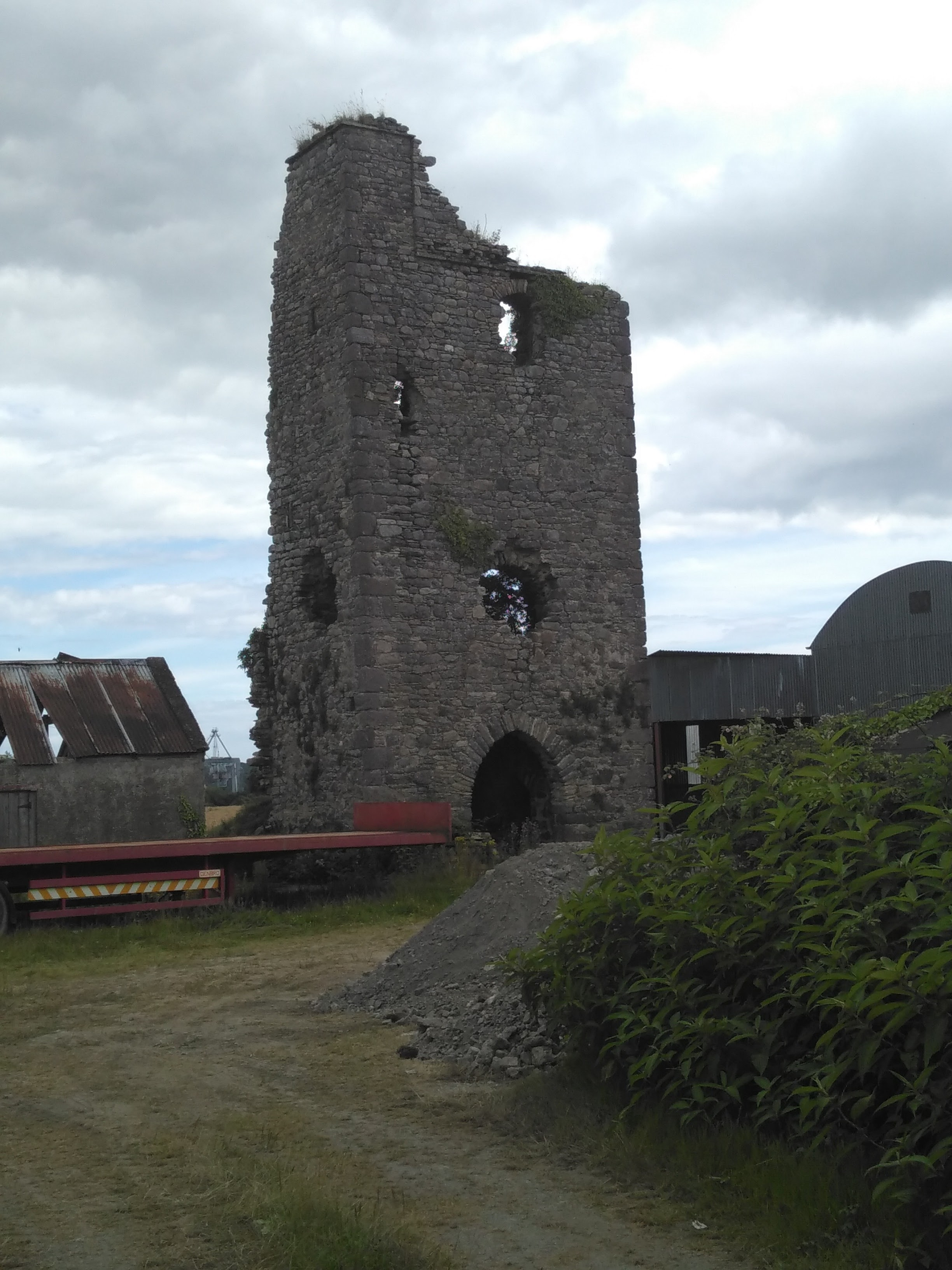 Gorteens Castle